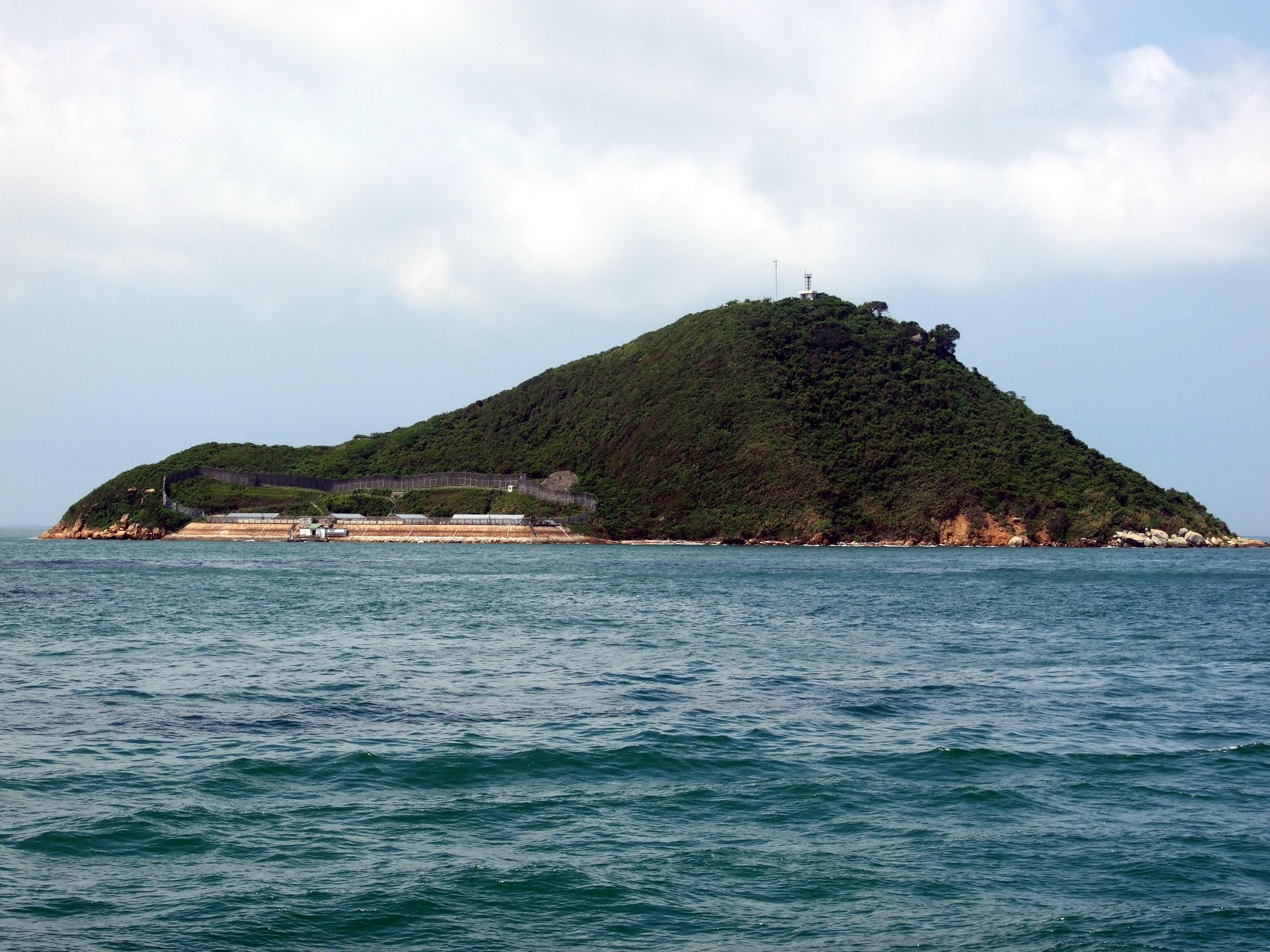 中文（香港）: 青洲